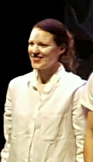 Recadrage et petit nettoyage de cette version : File:Rachel Graton au théâtre Denise Pelletier.jpg